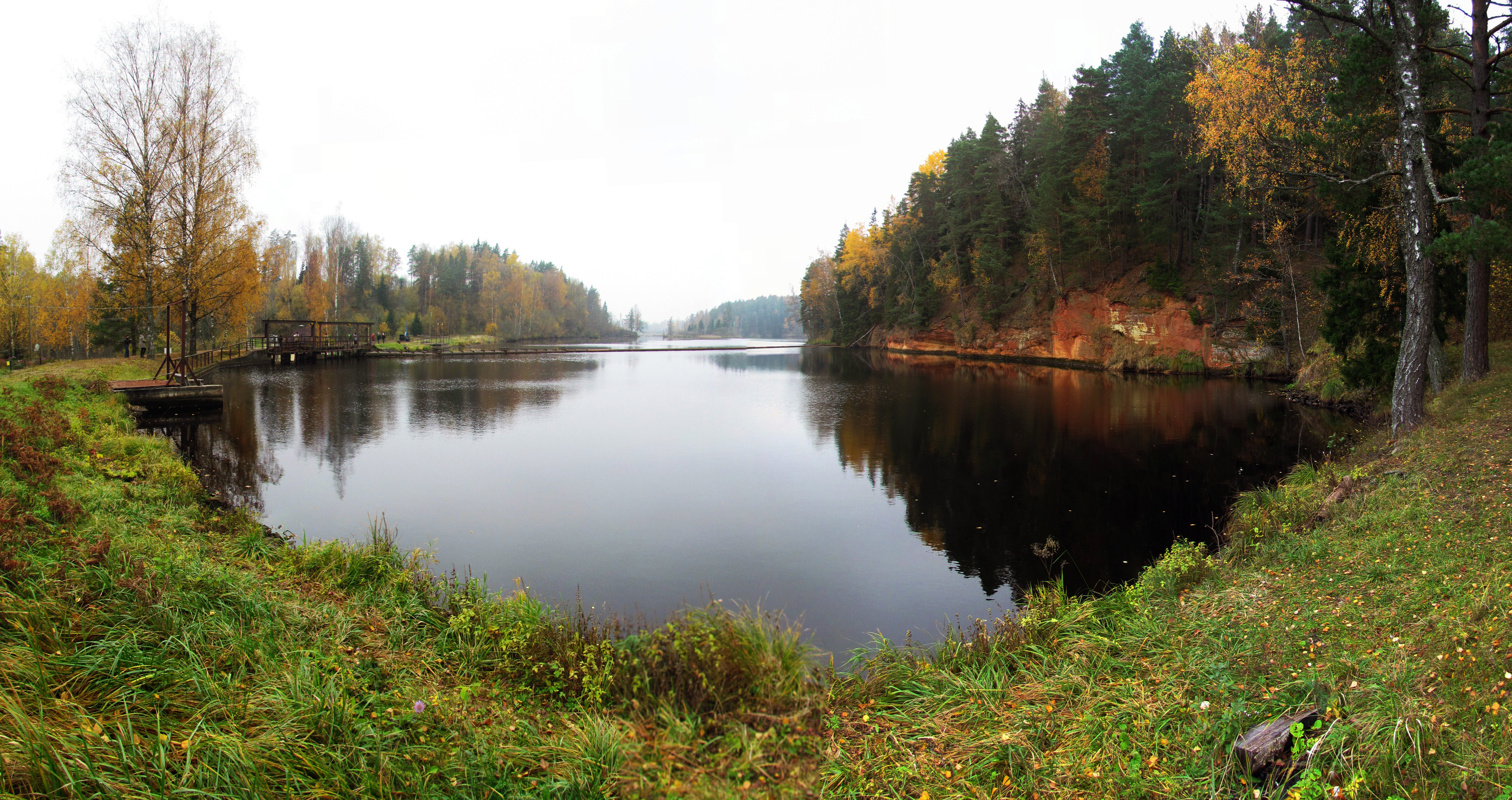 Braslas ūdenskrātuve